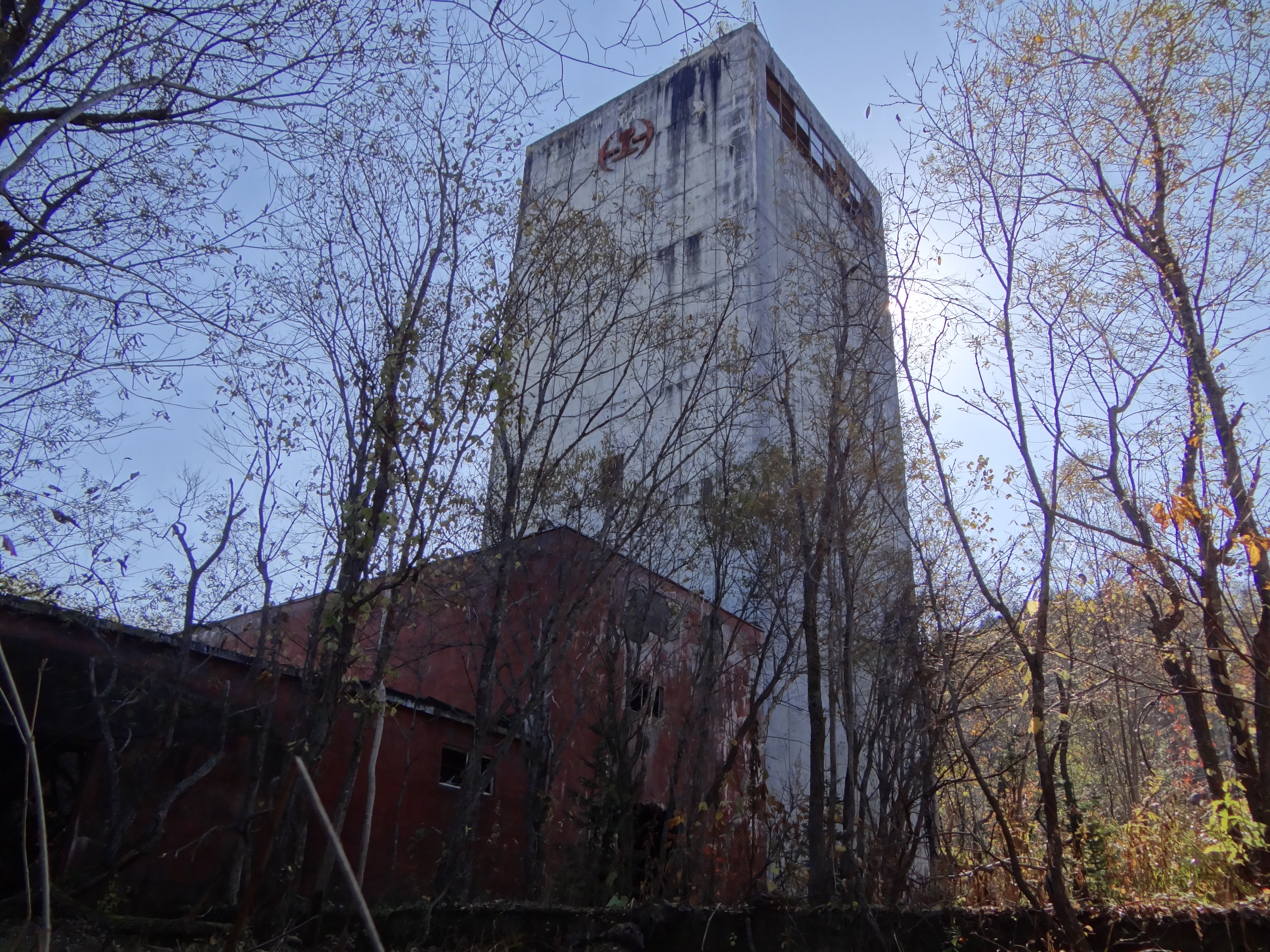 羽幌炭鉱 羽幌本坑立坑櫓